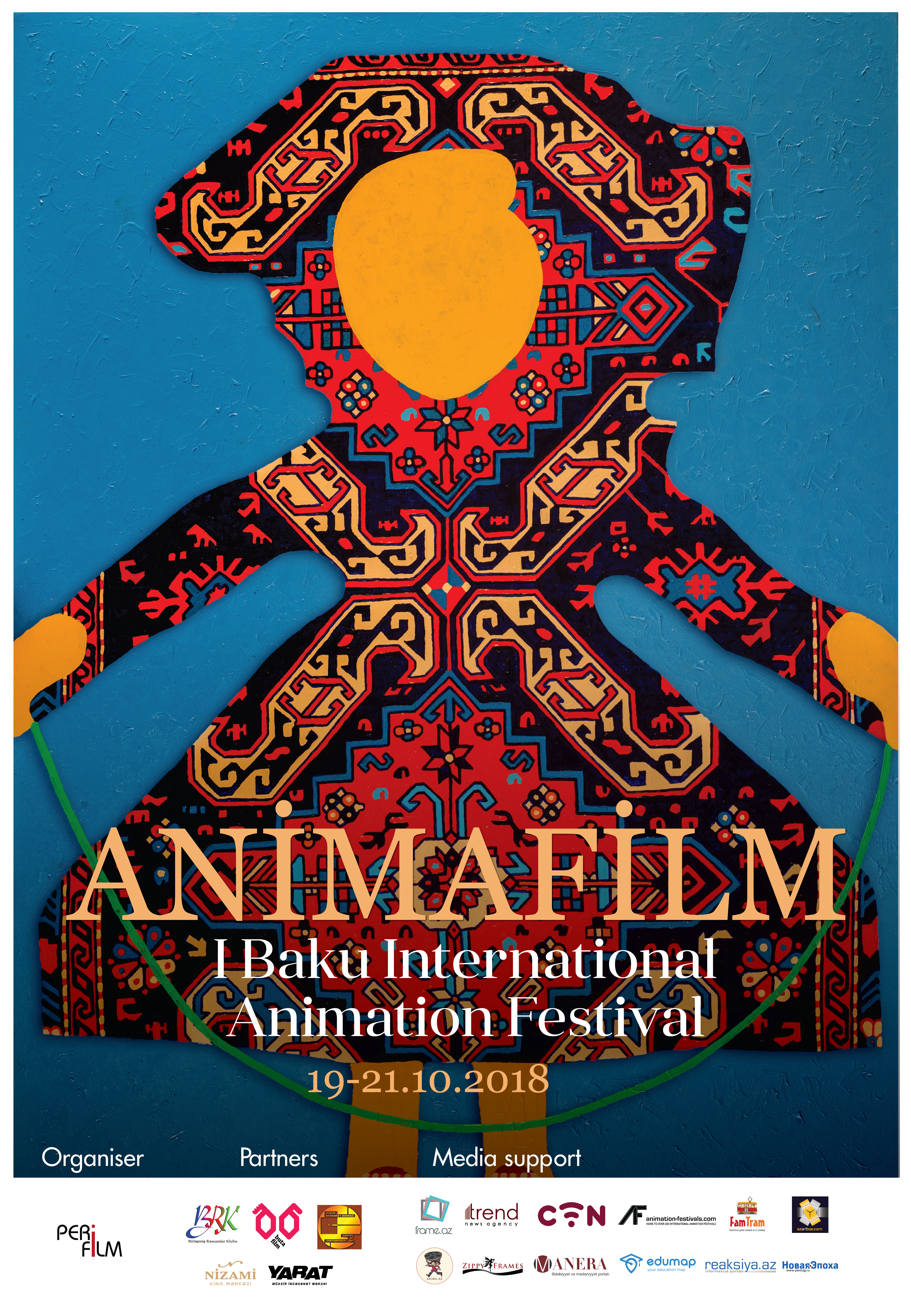 I ANİMAFİLM (2018)